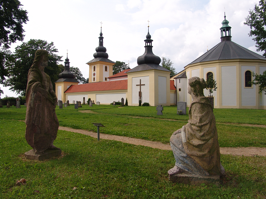 Kirche Maria Loreto in Altkinsberg